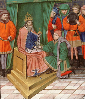 Jan II. Komnenos a Raimund II. z Tripolisu